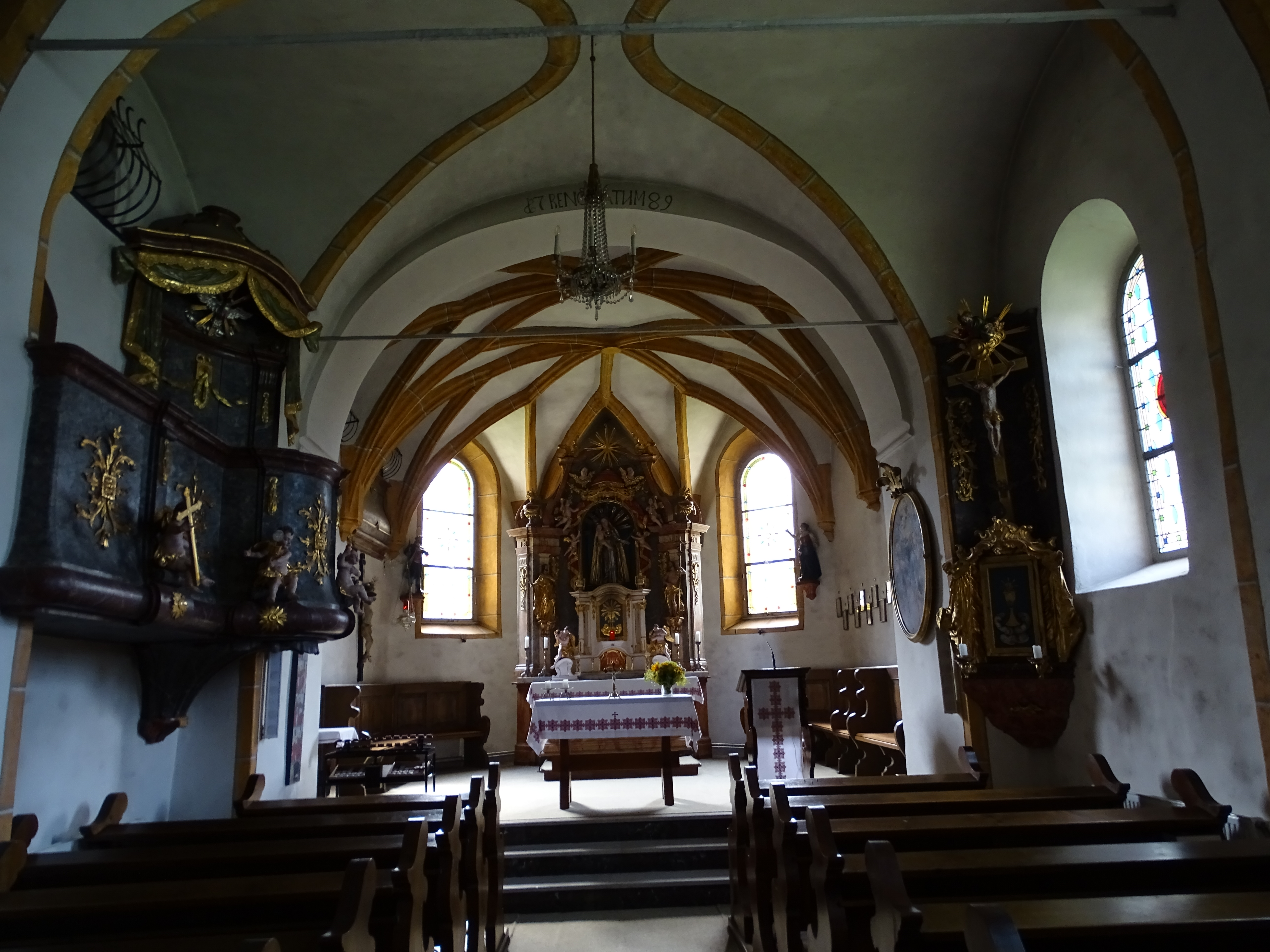 Blick auf den Hochalter der Pfarrkirche von Stiwoll